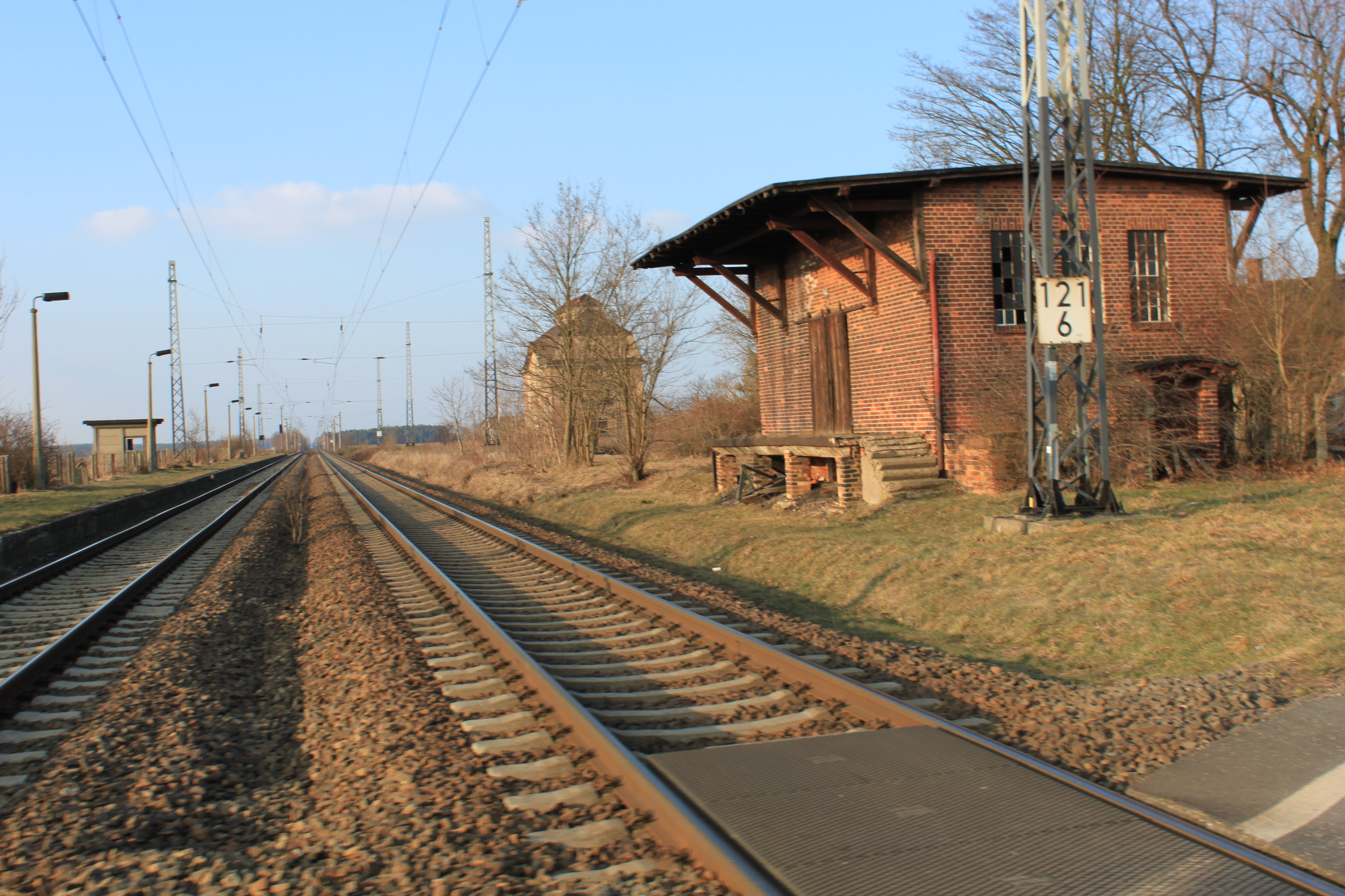 ehem, Bahnhofs Saxdorf, Güterschuppen, im Hintergrund der Kornspeicher. Rechts Gleis in Richtung Falkenberg, links in Gegenrichtung.